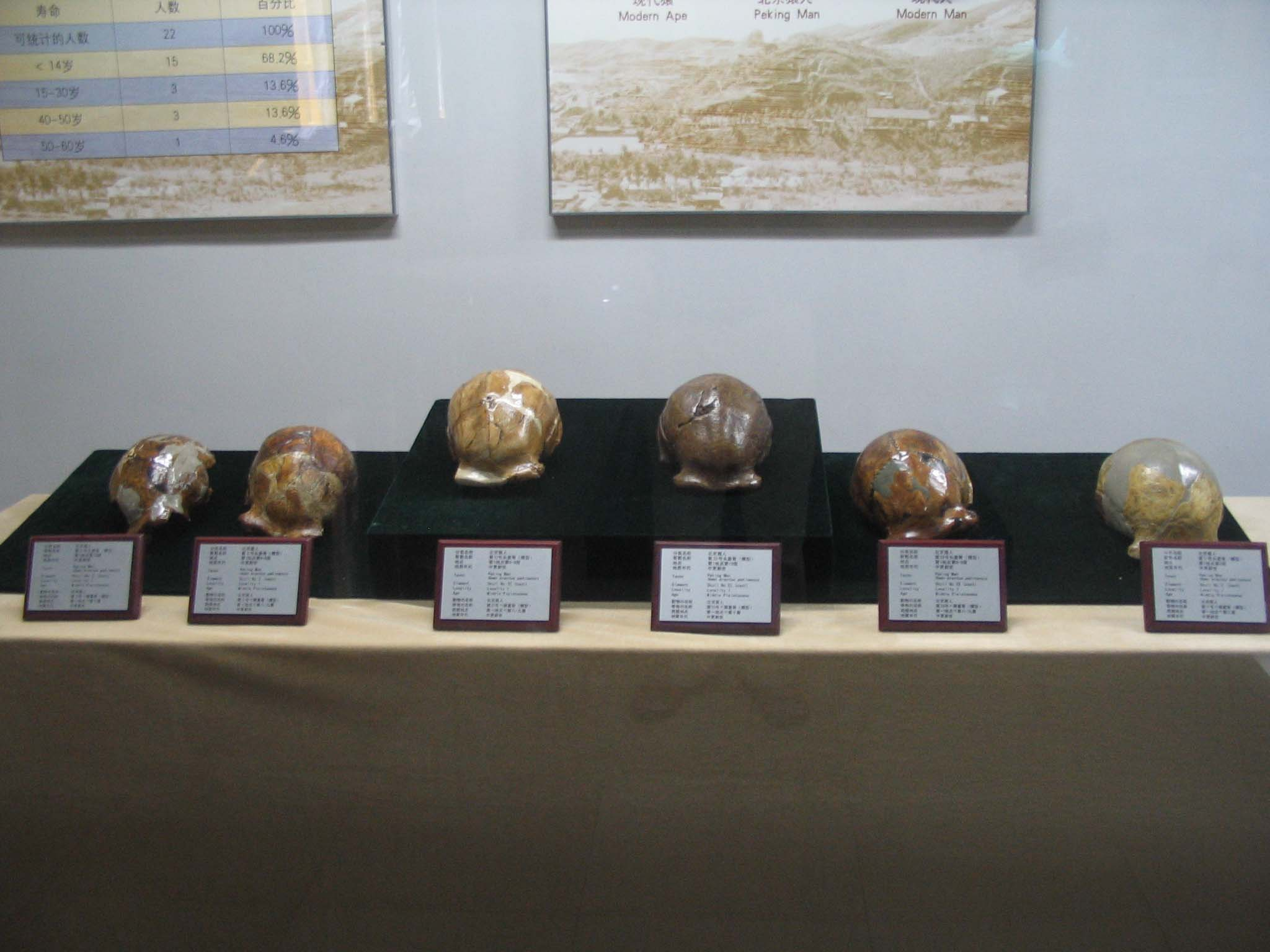 Skulls of peking man 北京人的头骨